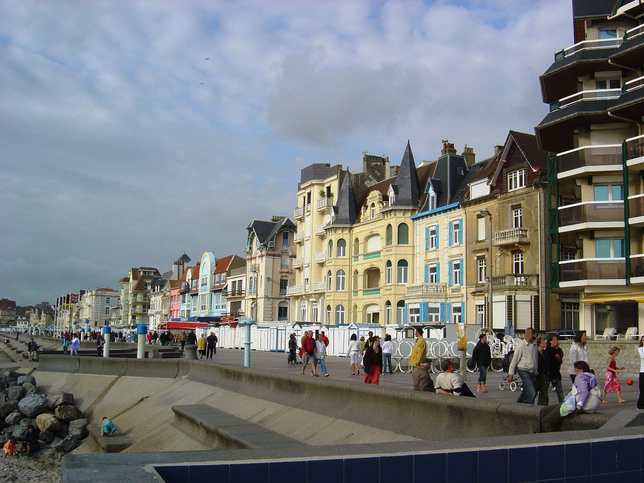 Front de mer a Wimereux (Pas de Calais) France